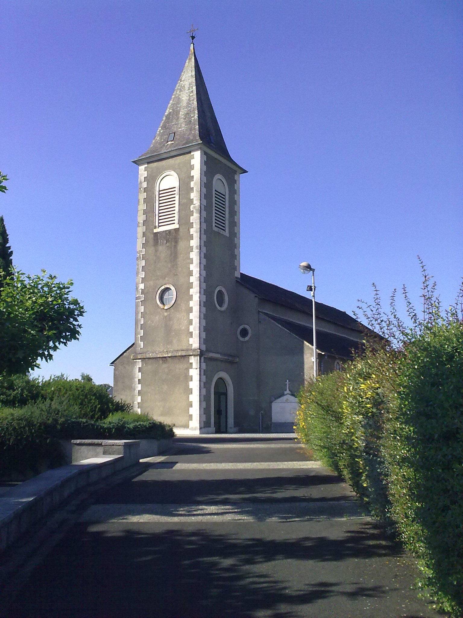 Eglise de Meillon.